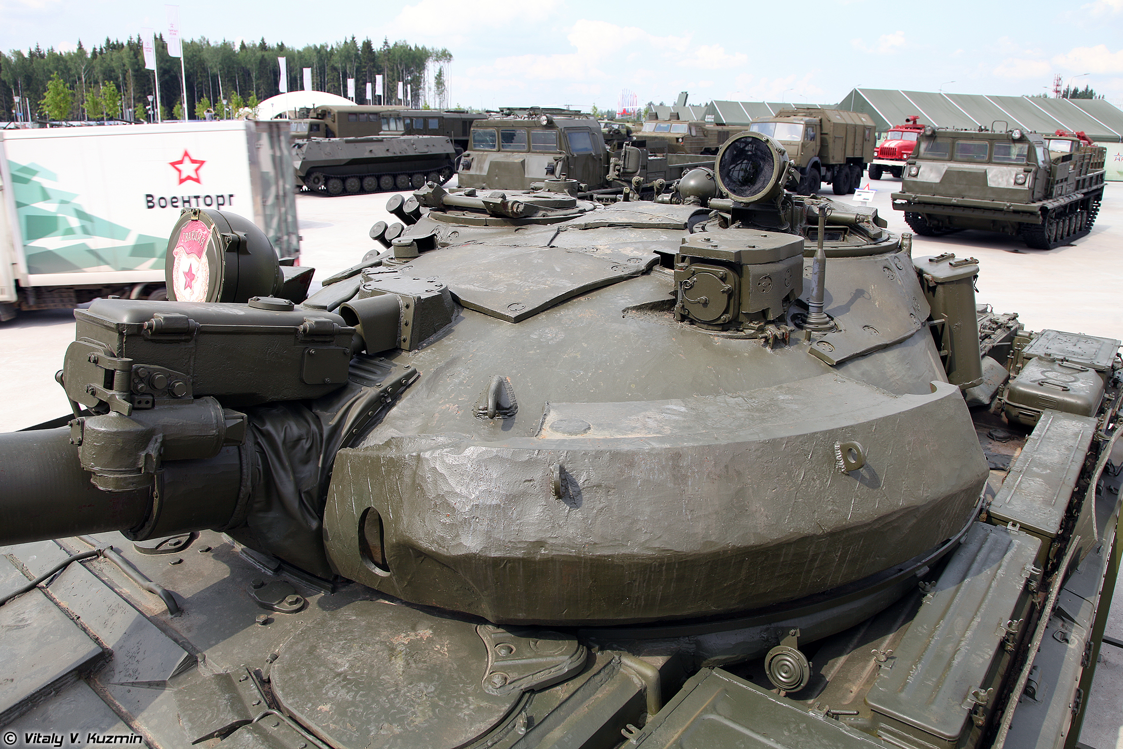 T-62M